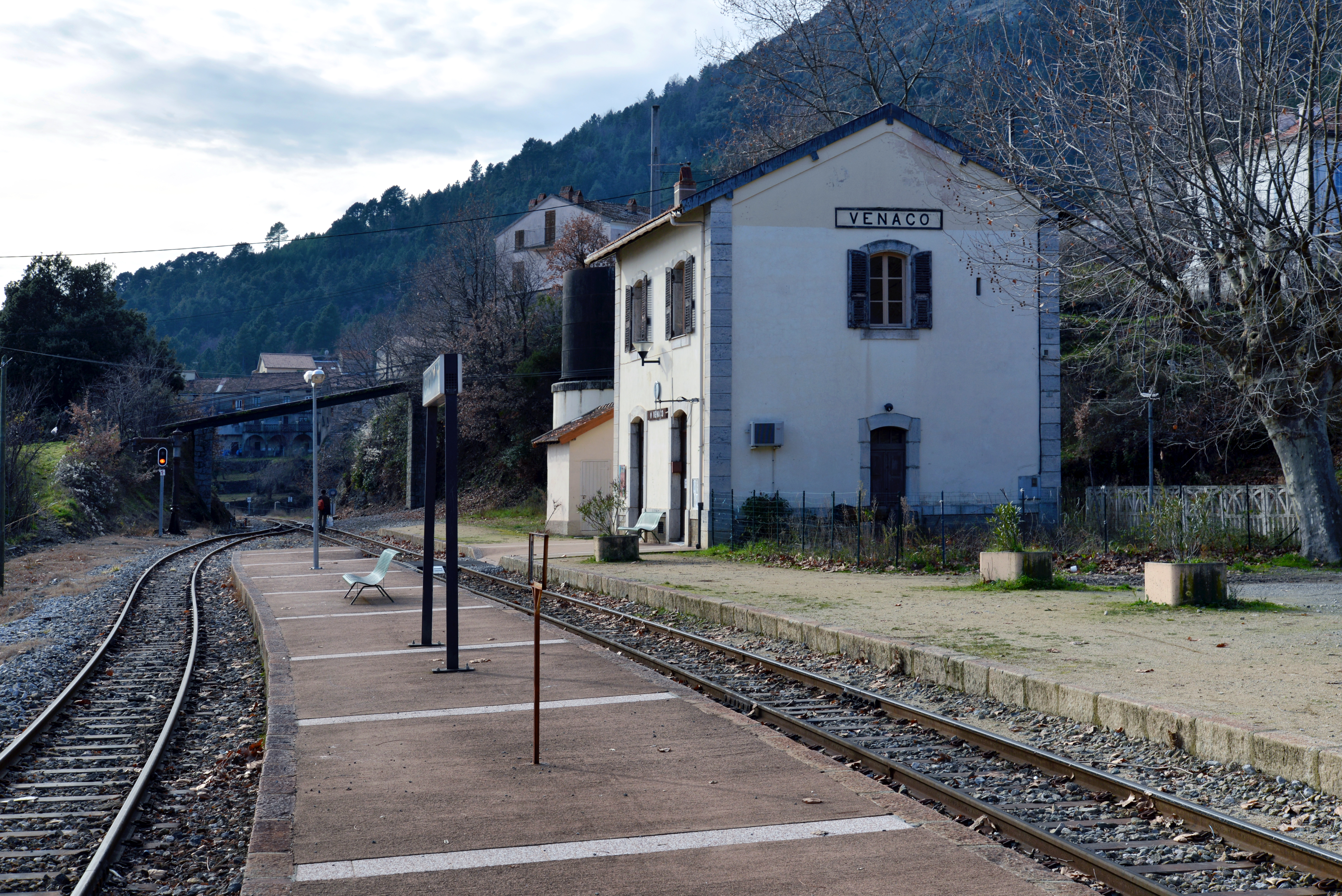 Venaco, Centre Corse - La gare